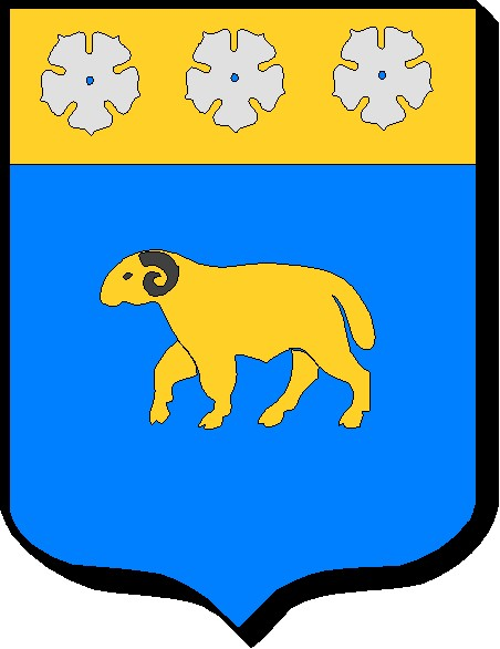 Coat of Arms François de Montholon, Garde des Sceaux France